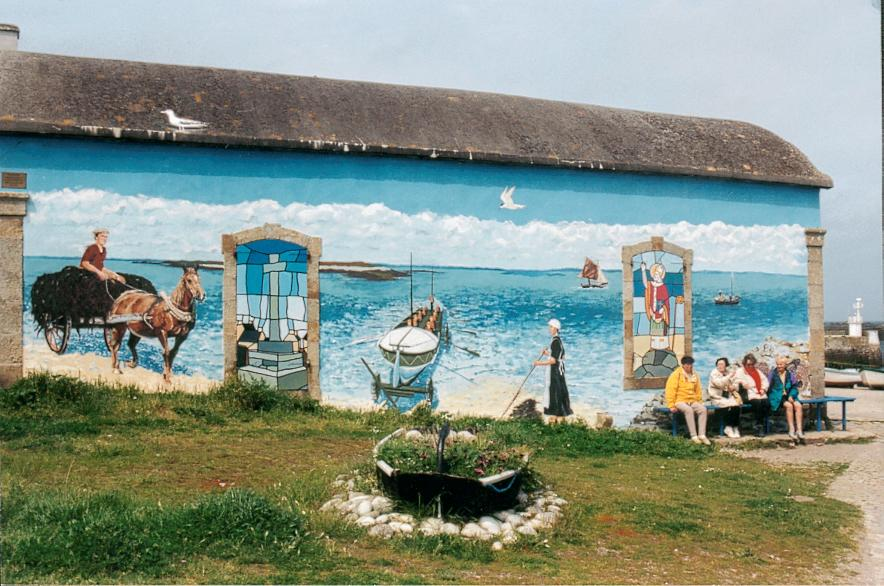 Fresque sur un bâtiment du port (l'Abri Amiral Roussin) de l'Île-Molène résumant les principales caractéristiques de l'île.